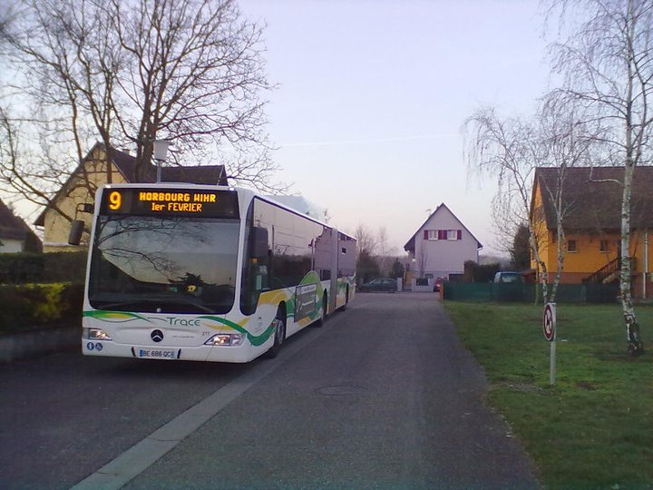 Mercedes-Benz Citaro G GNV